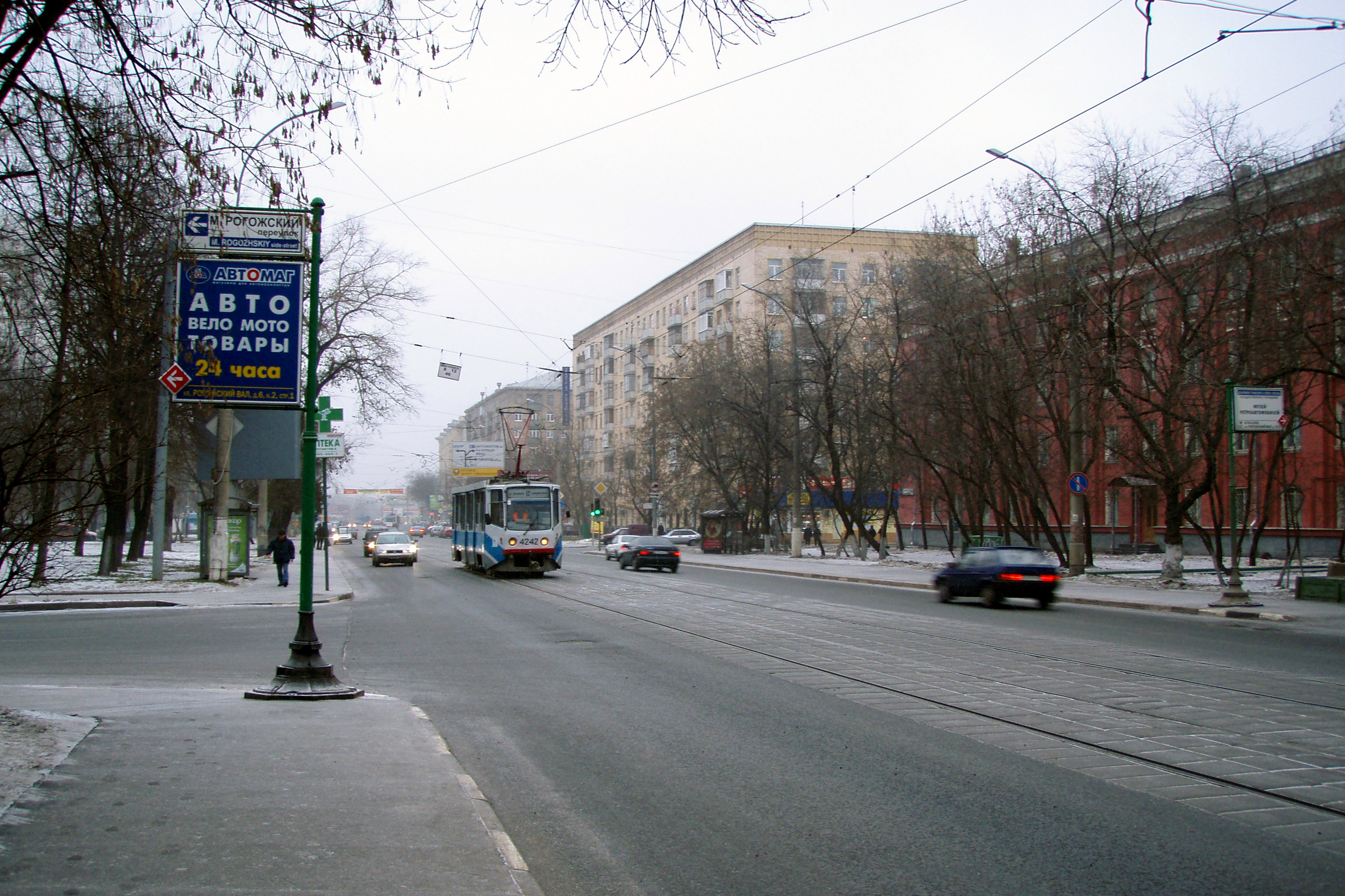 Улица Рогожский Вал у Малого Рогожского переулка в Москве.